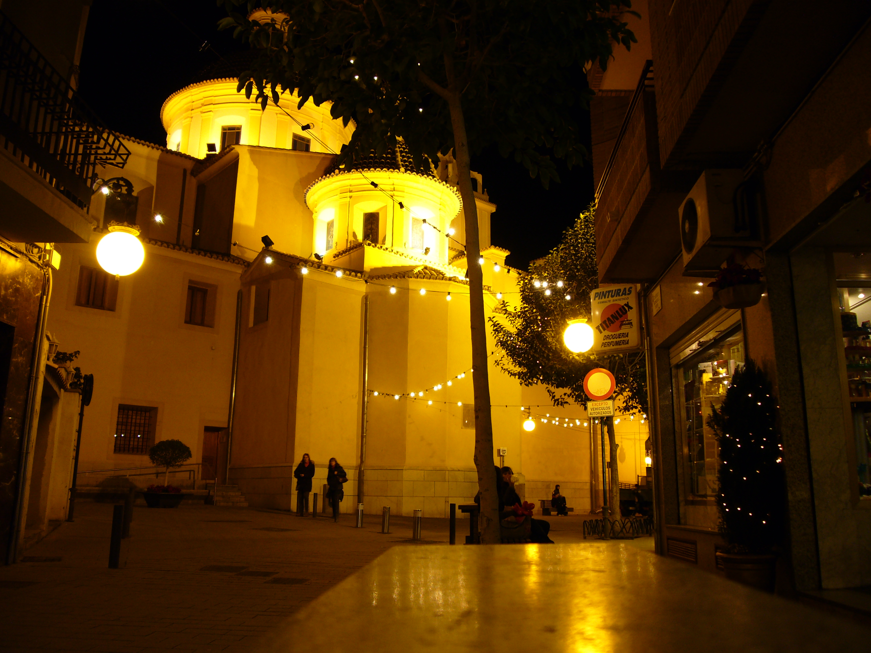 Fachada nocturna en navidad, de la Iglesia San Vicente Ferrer de San Vicente del Raspeig (Alicante).